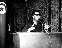 Ahmed ben Salah, former tunisian minister